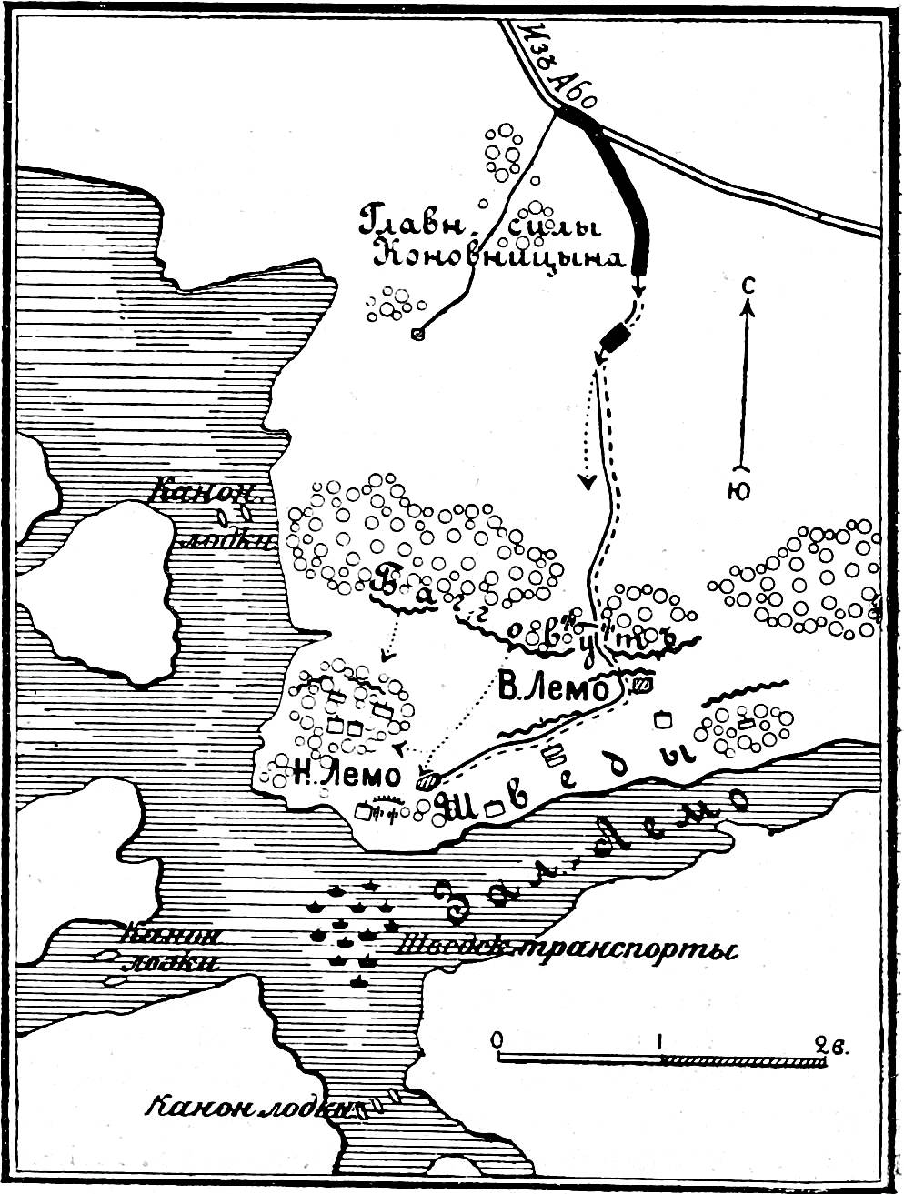 Эта картинка была использована для иллюстрирования статьи «Лемо» опубликованной в четырнадцатом томе «Военной энциклопедии», который был издан книгоиздательским товариществом И. Д. Сытина в 1914 году в столице Российской империи городе Санкт-Петербурге. Более подробное описание к этому рисунку можно прочесть в указанной выше статье на сайте Русской Викитеки.